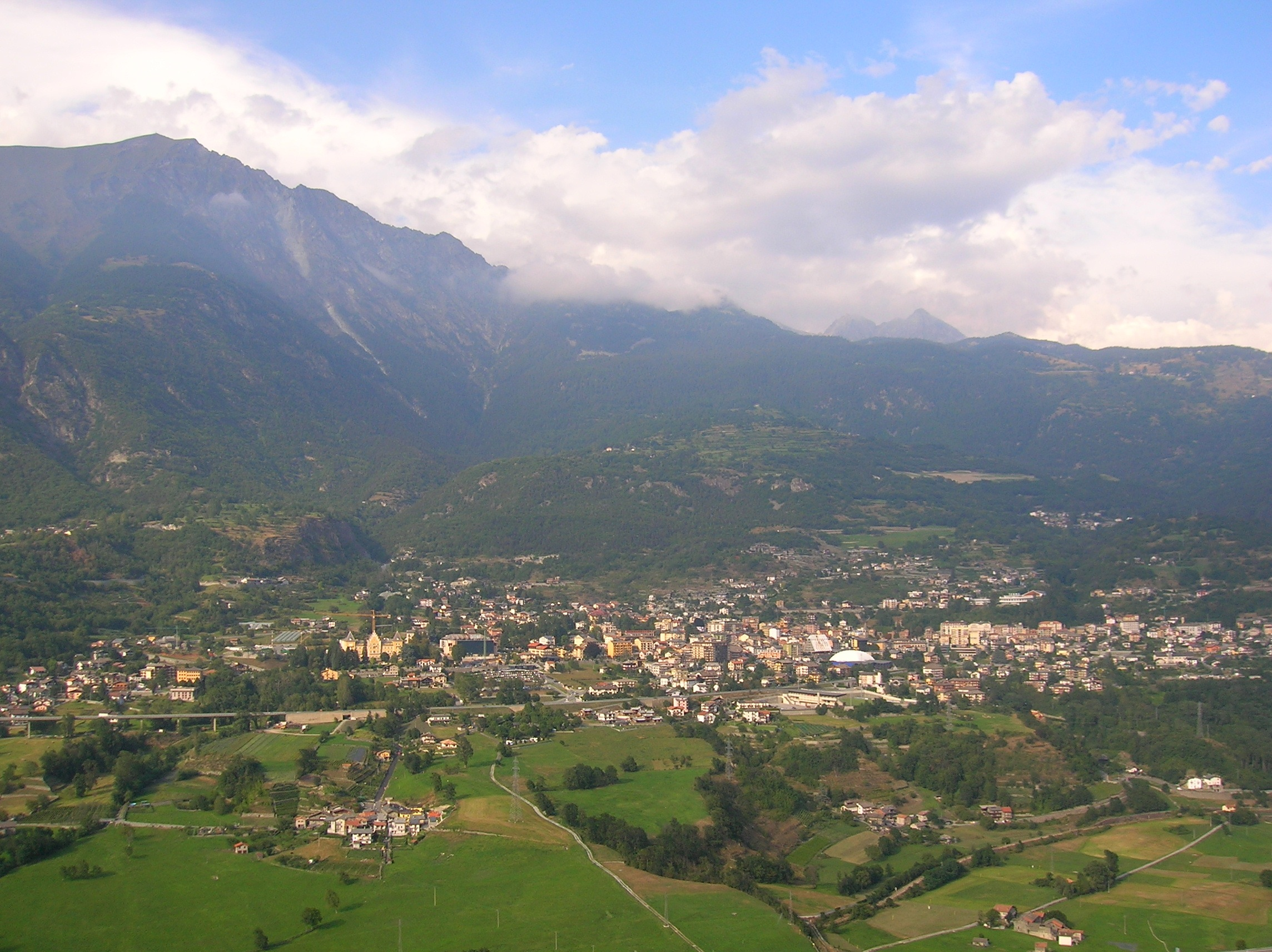 Saint-Vincent vista dal castello di Ussel. Saint-Vincent, Valle d'Aosta, Italia.